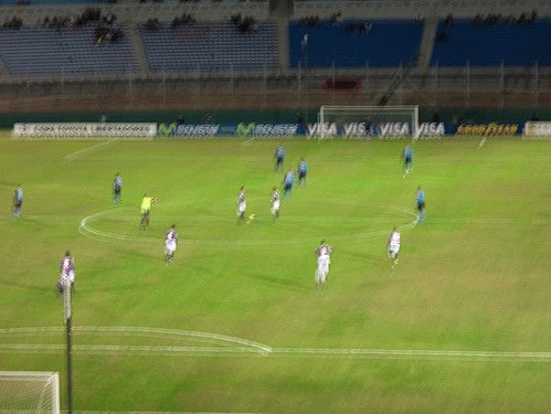 Jogo do Grêmio na libertadores 2007 no Uruguai